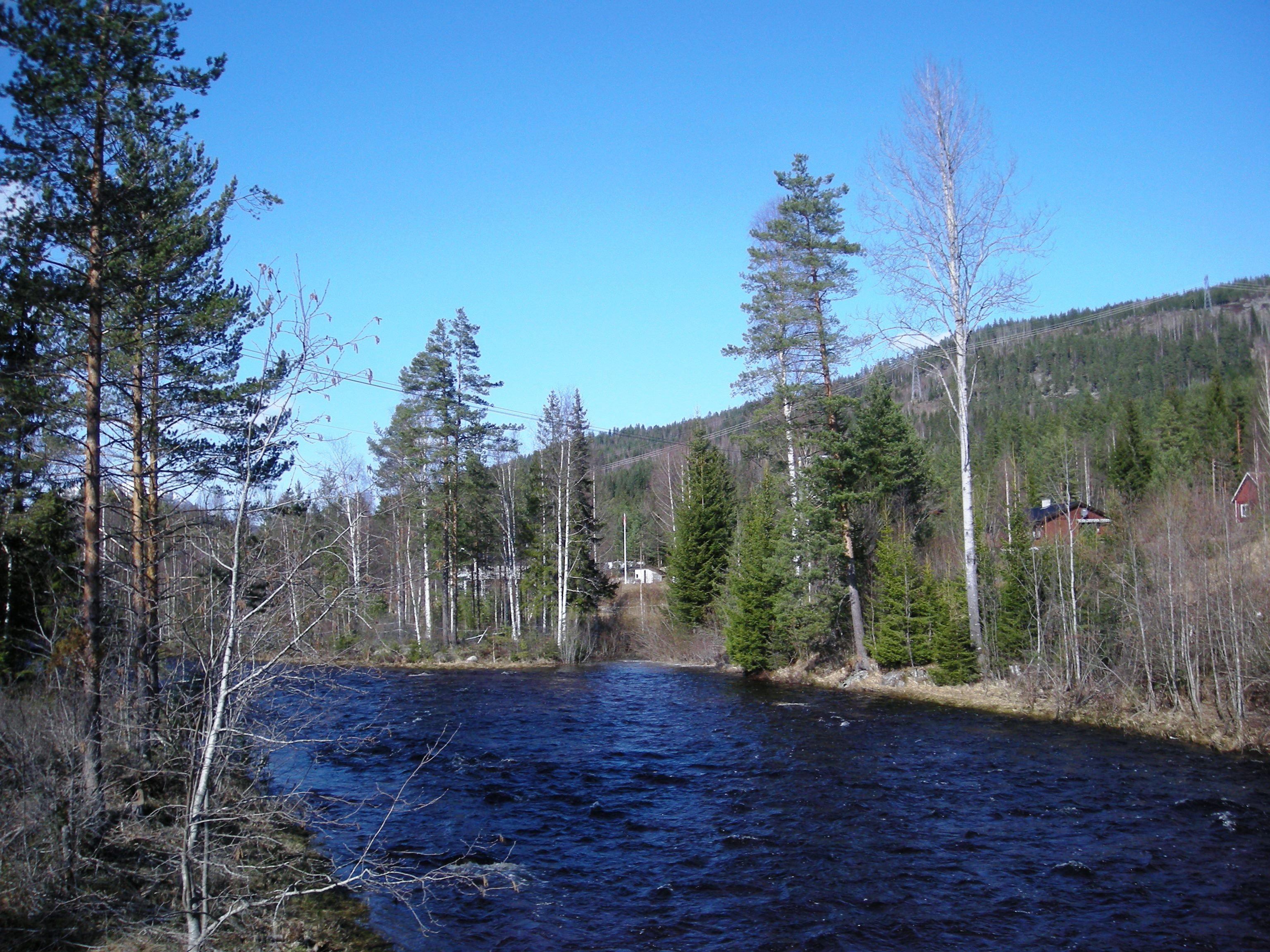 Strømsoddelva (Ringerike kommune)